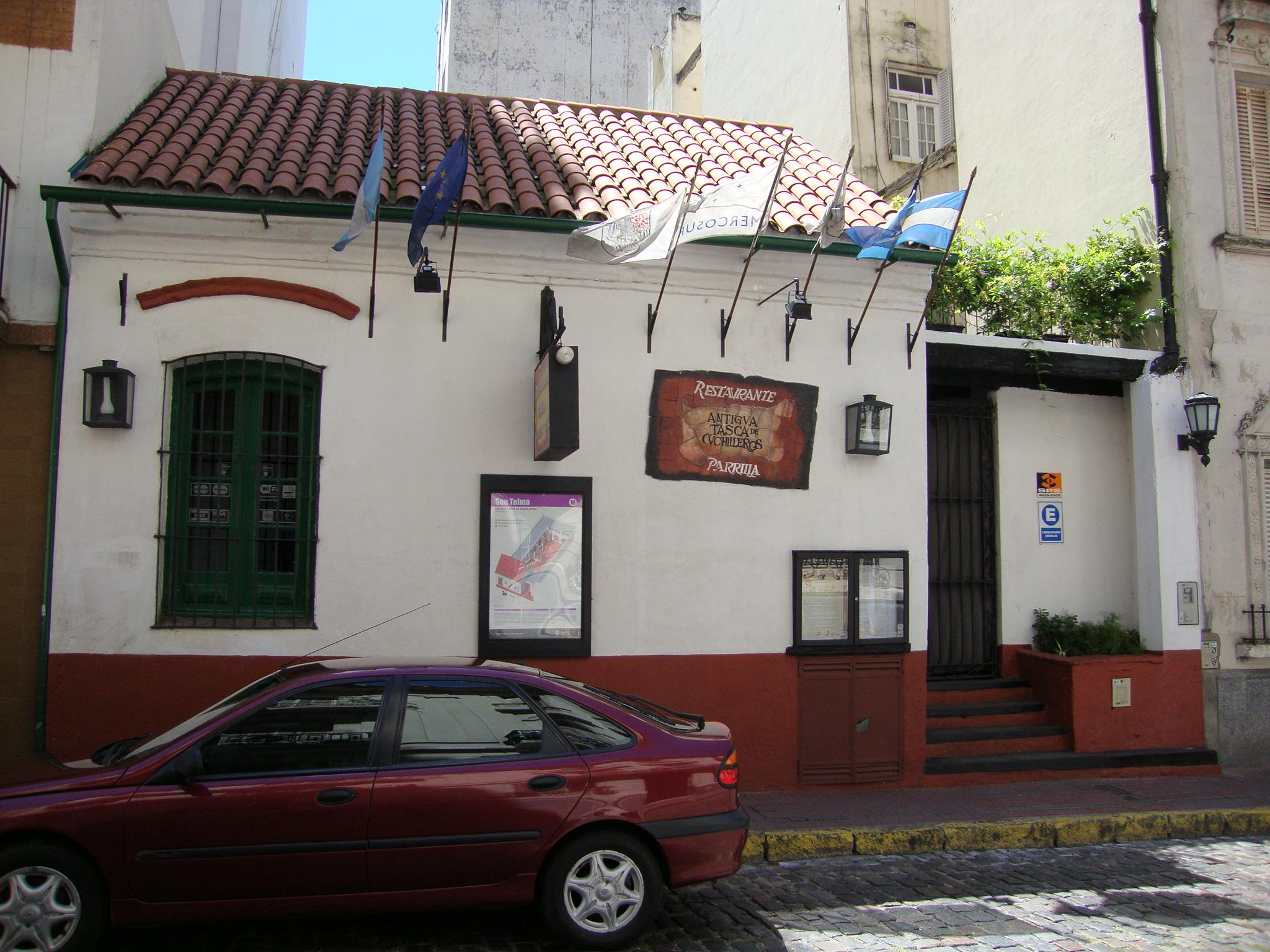 Casa colonial conocida como Antigua Tasca de Cuchilleros. Funciona en ella un restaurante. Calle Carlos Calvo 319, San Telmo.